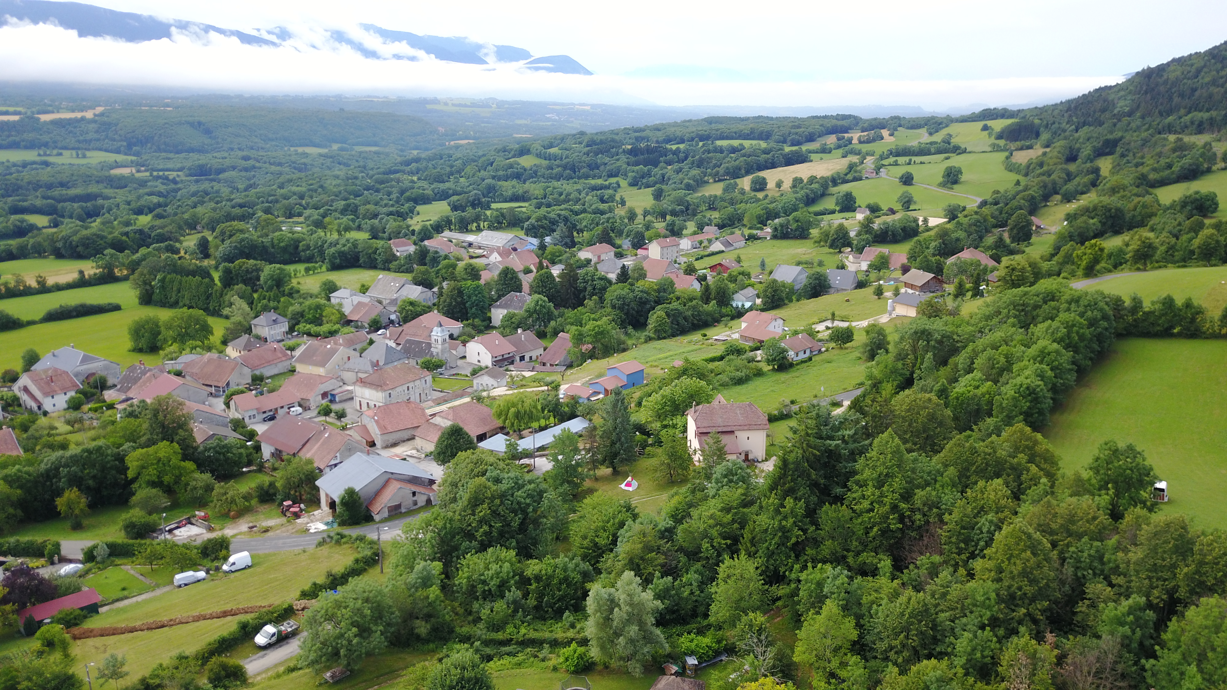 Photo prise avec un drone DJI Mavic Pro